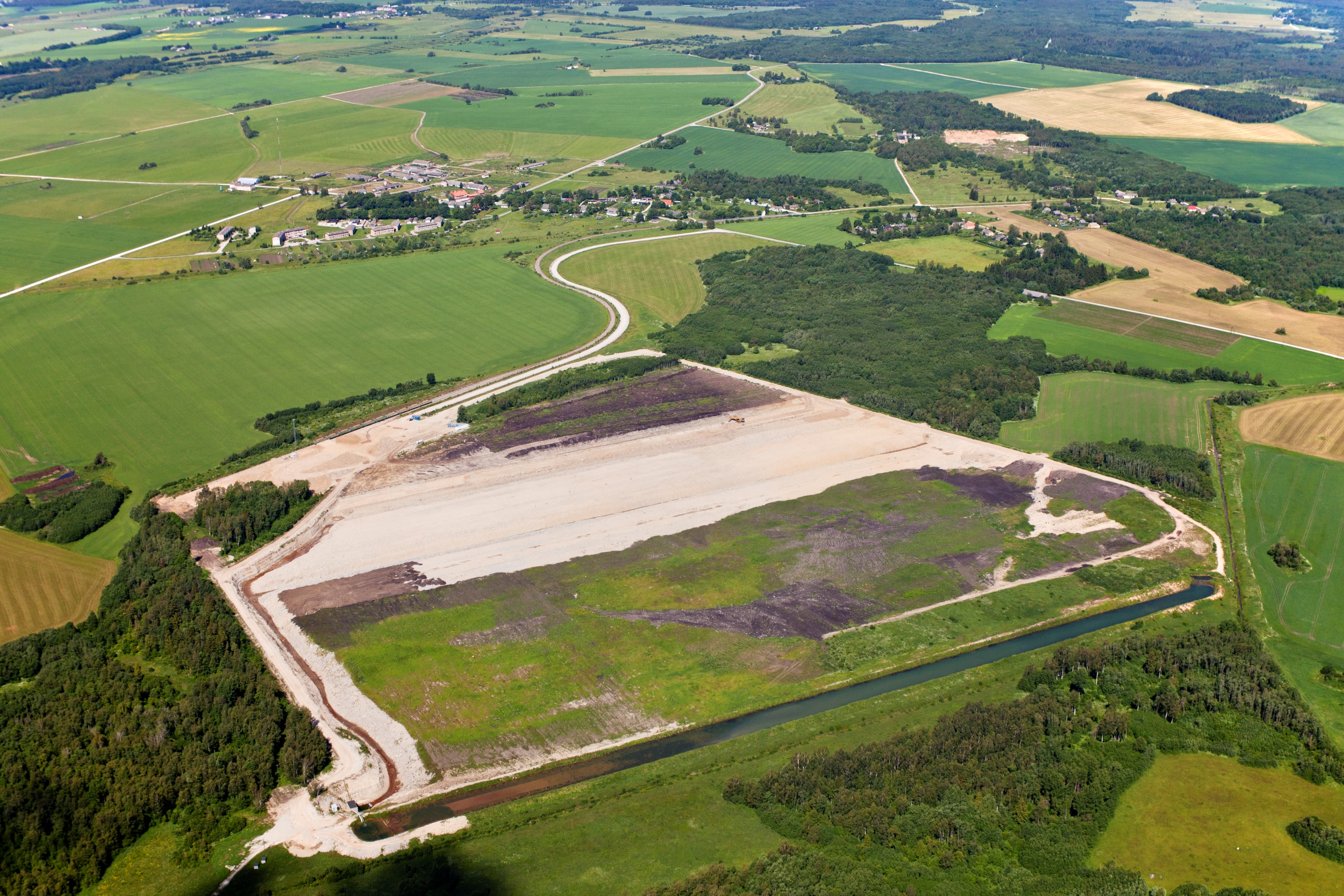 Ubja põlevkivikarjäär